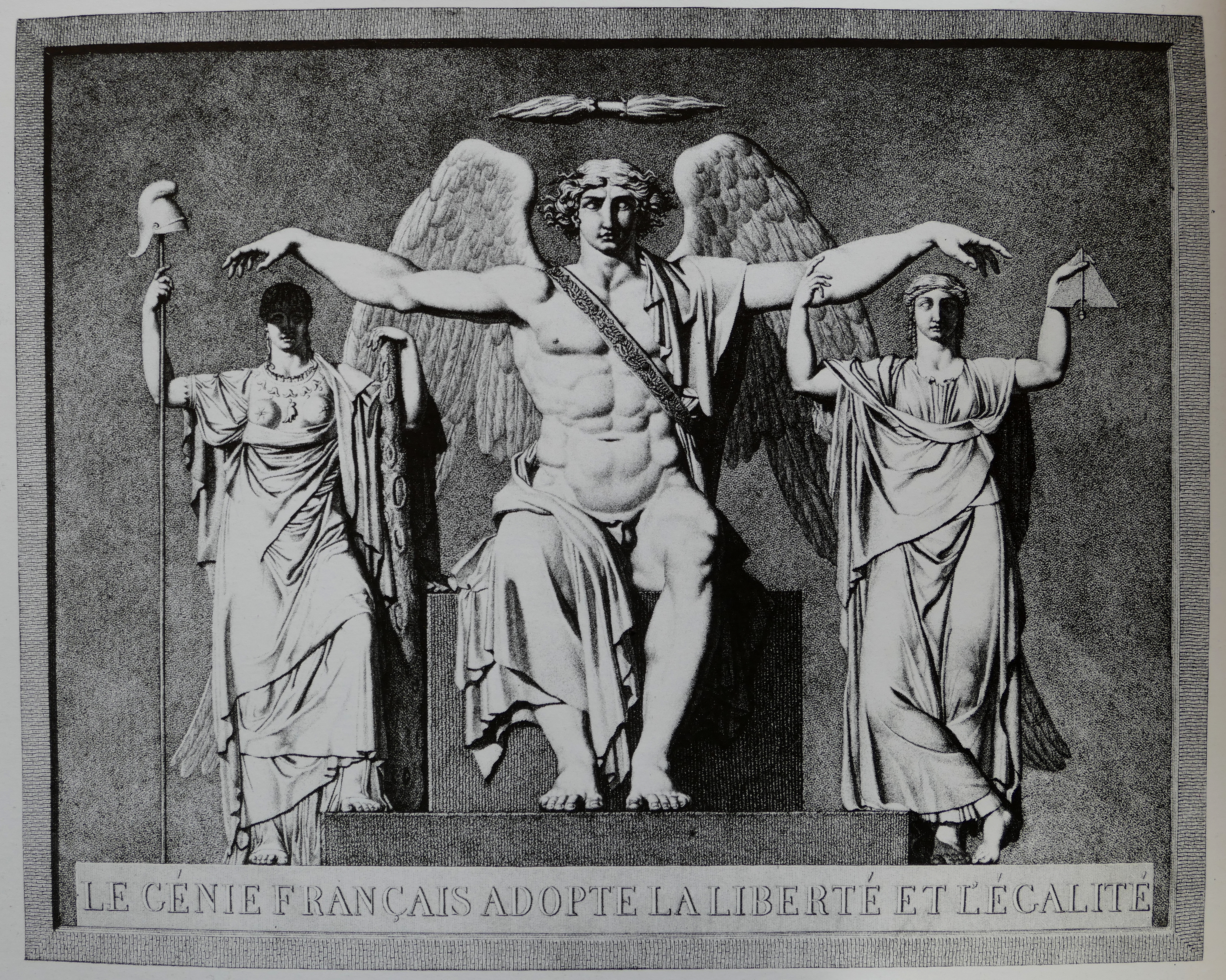 Gravure par Louis-Jean Allais, 1794, Le Génie français adopte la Liberté et l'Égalité, Bibliothèque nationale de France, collection Hennin, N°inv : 11978.